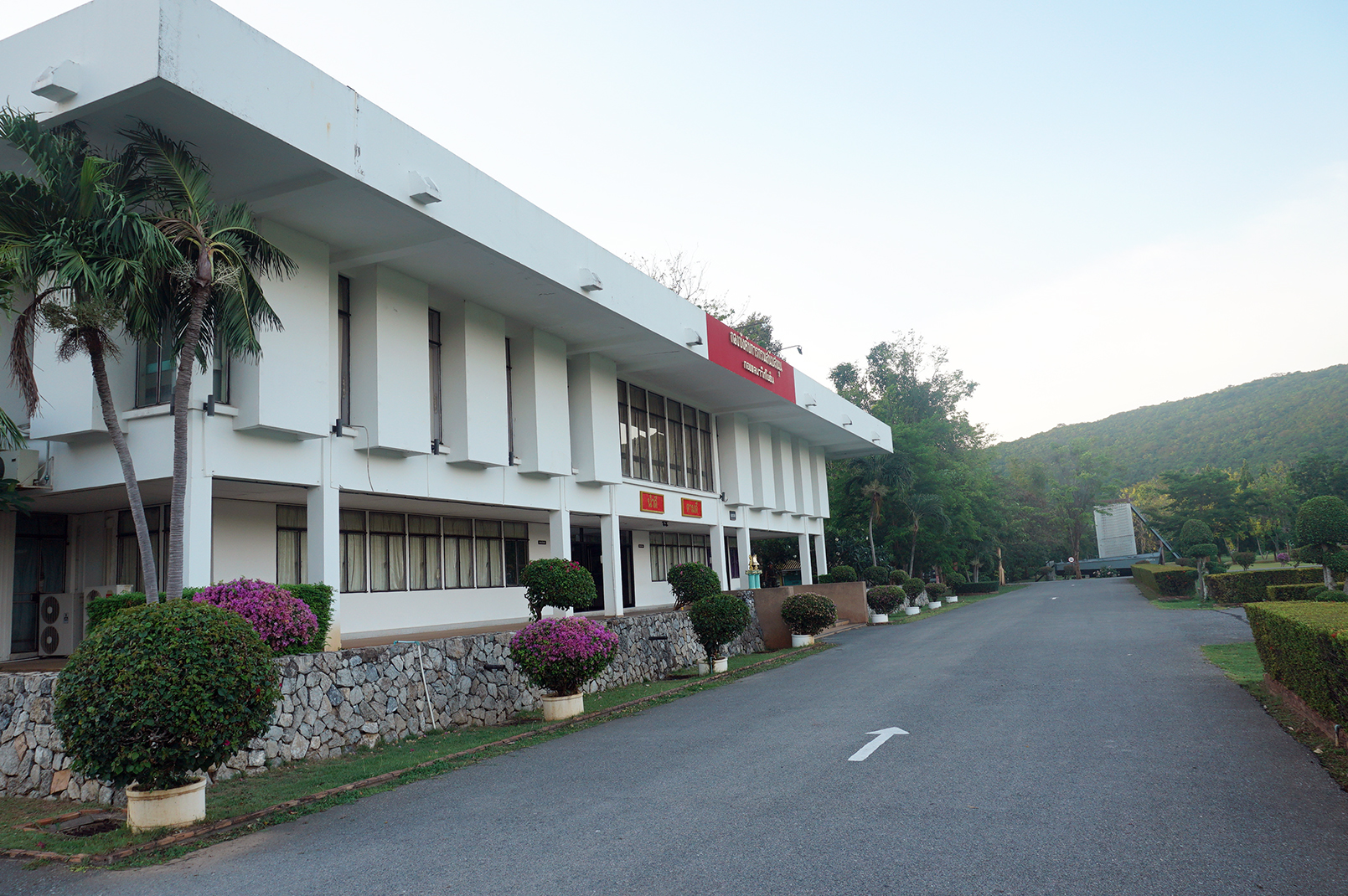 กองร้อยกองบังคับการ กรมสนับสนุน กองพลนาวิกโยธิน